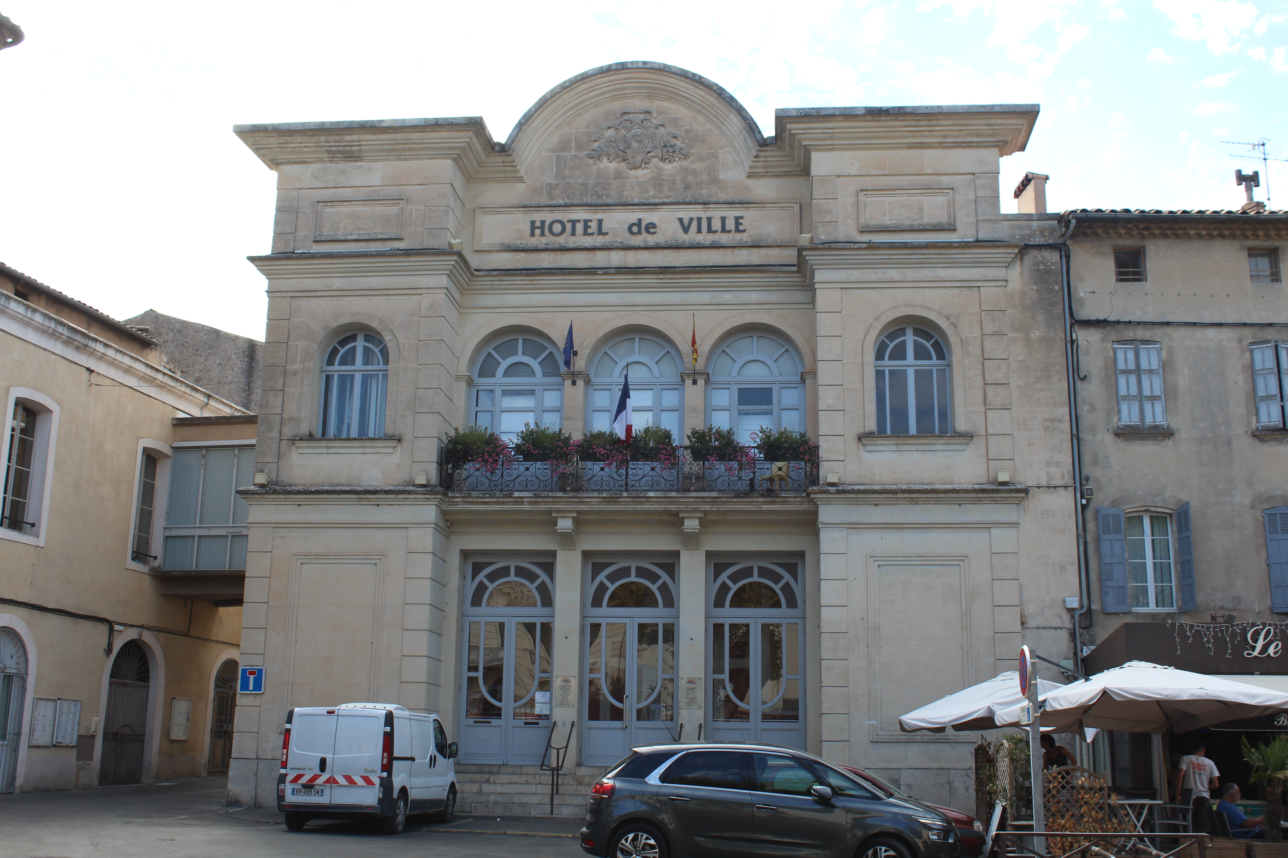 Hôtel de ville d'Apt.